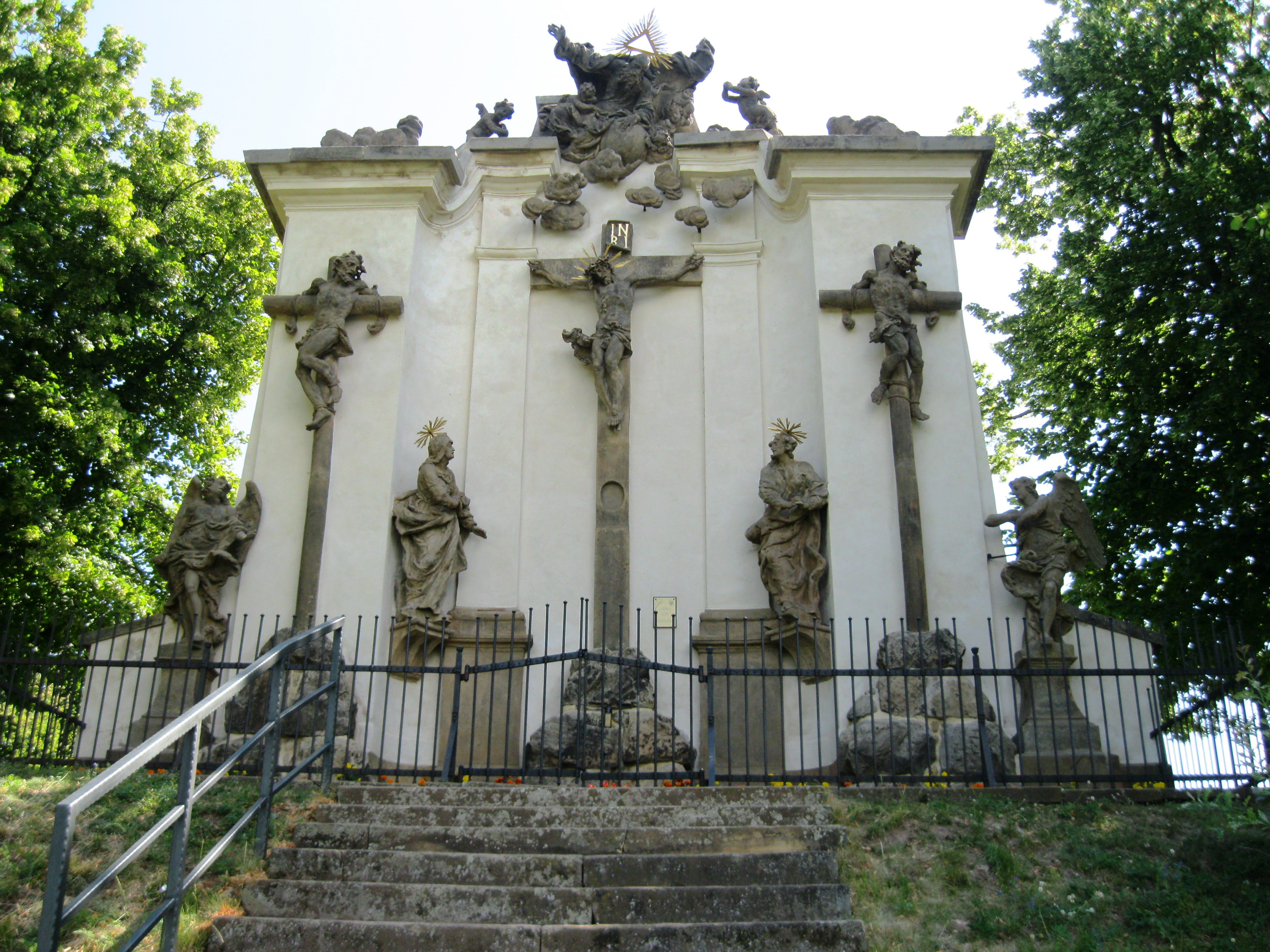 Sousoší Kalvárie - stěna se sochařskou výzdobou (Moravská Třebová), nad hřbitovem na Křížovém vrchu, Moravská Třebová